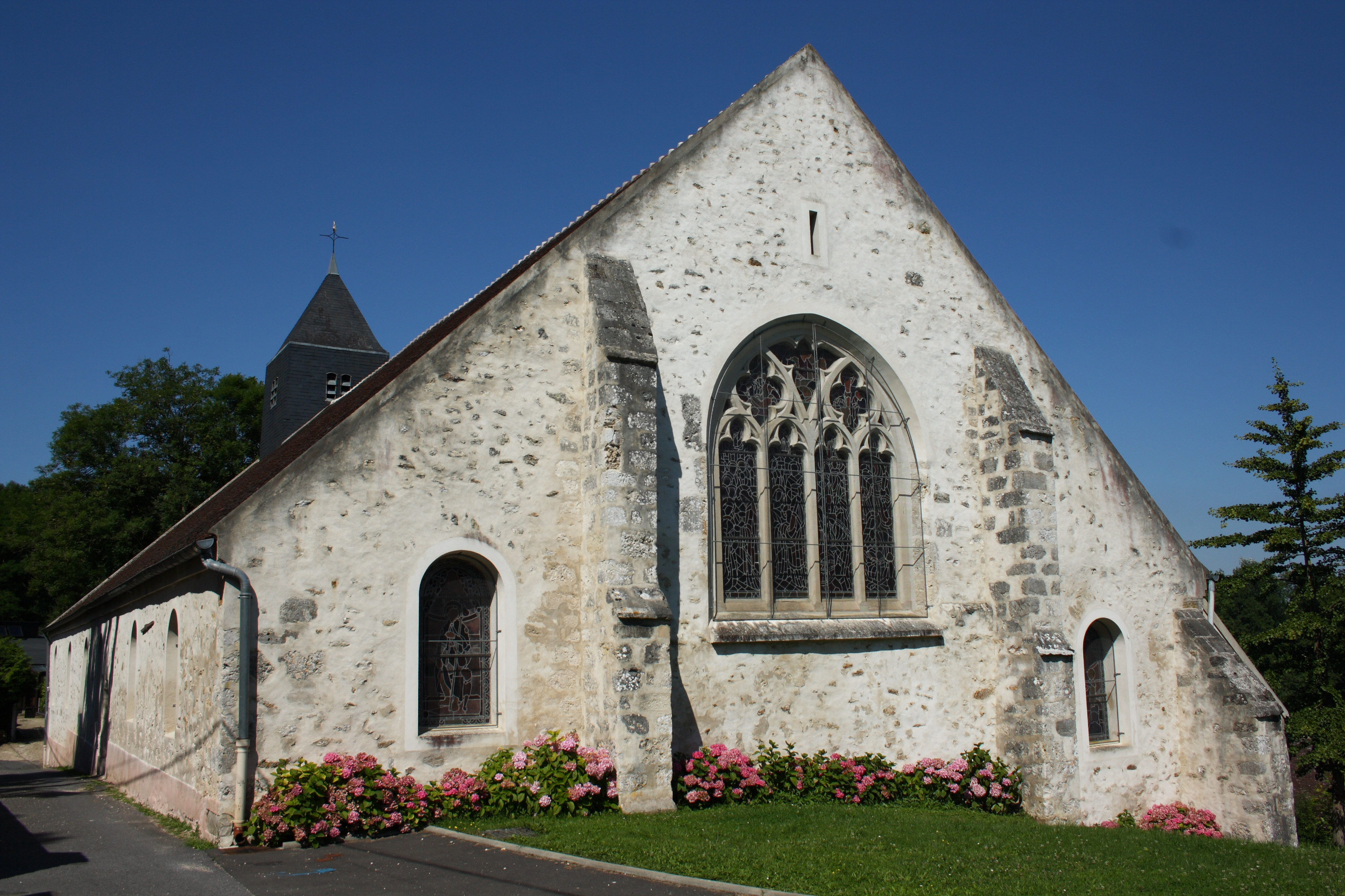 Katholische Kirche Saint-Sulpice in La Celle-sur-Morin im Département Seine-et-Marne in der Region Île-de-France (Frankreich), gerade geschlossene Apsis